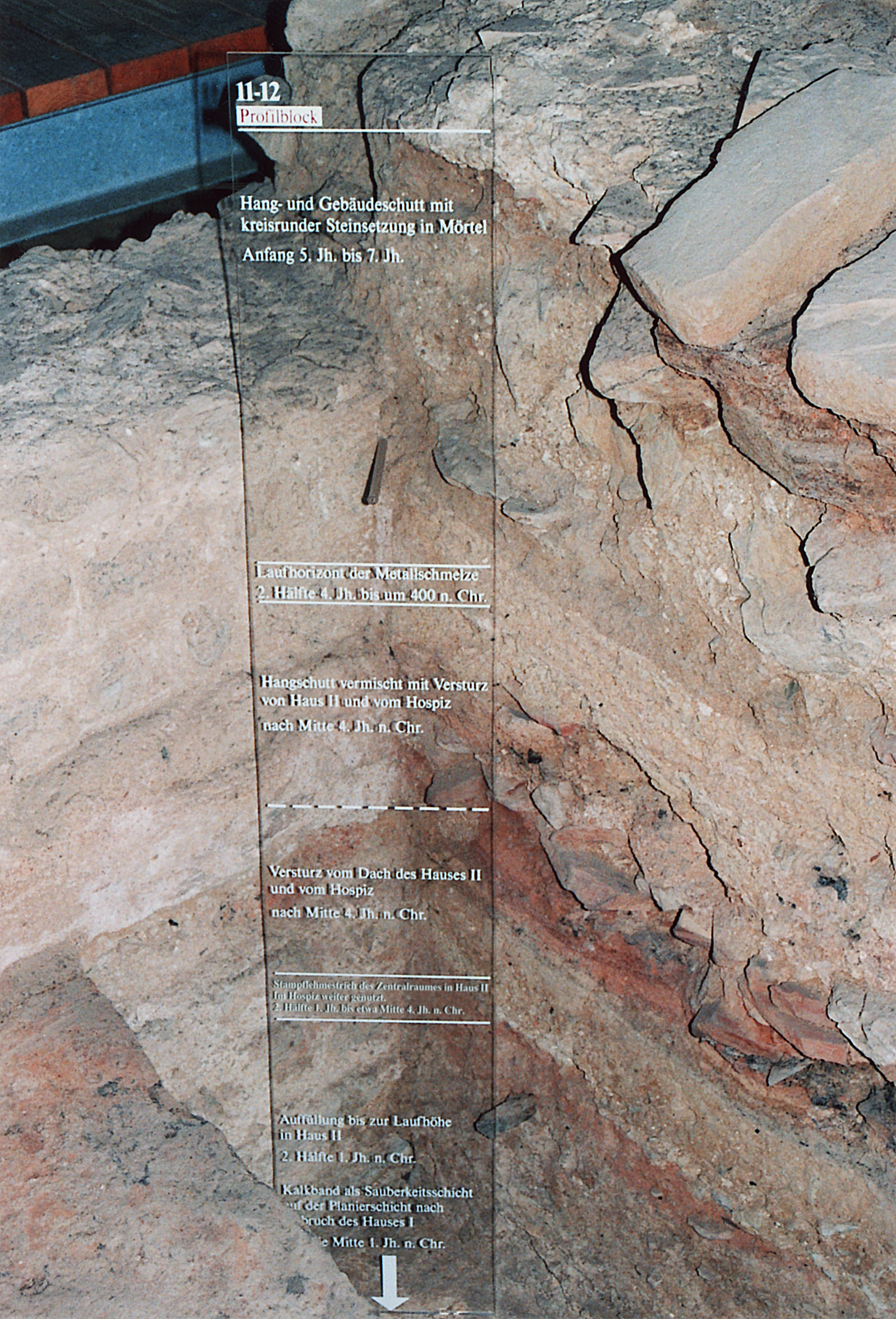 Villa Rustica Ahrweiler: Profilblock im Zentralraum von Haus II.